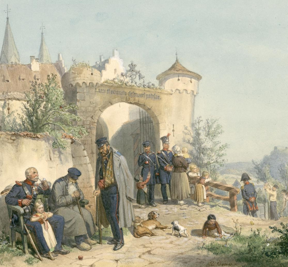 Kloster Großcomburg, im 19. Jahrhundert Wohnort der "Württembergischen Ehreninvaliden"